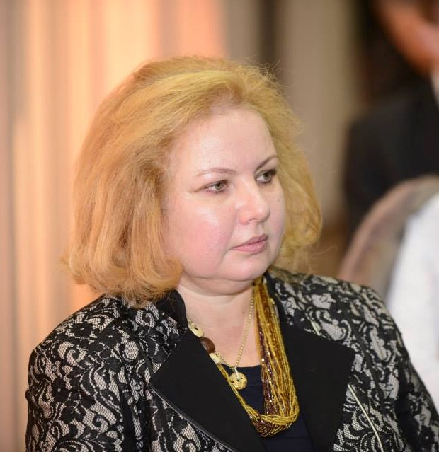 Тихомирова Ірина Олегівна